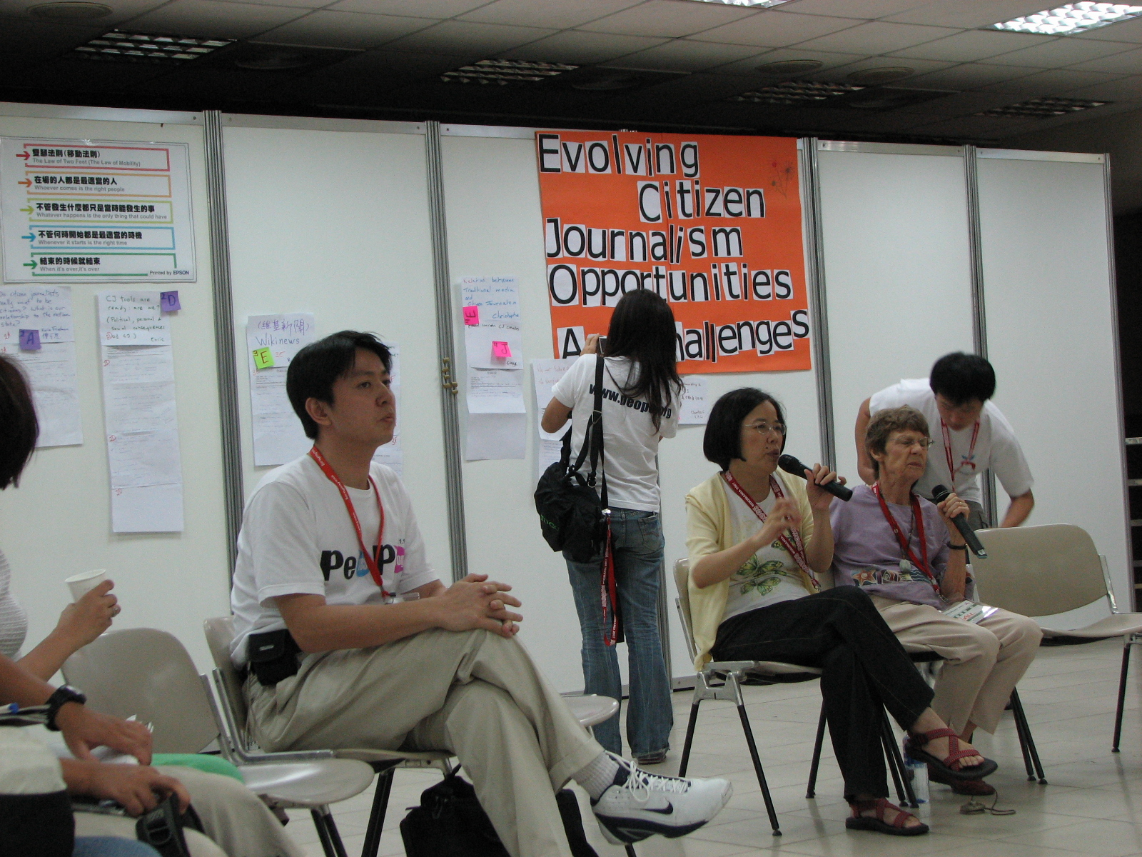 citizen journalism unconference